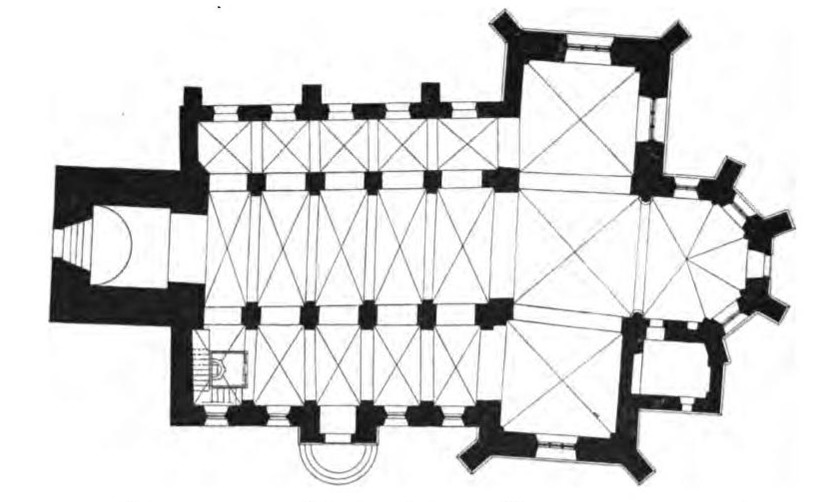 Evangelische_Kirche_Gummersbach